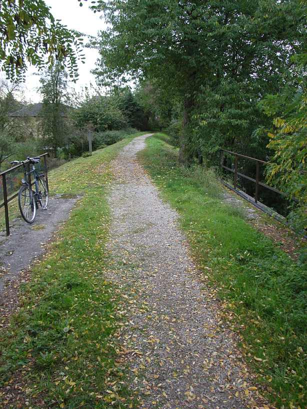 Hückelhoven-Baal; Trasse der stillgelegten Bahnstrecke Dalheim-Linnich